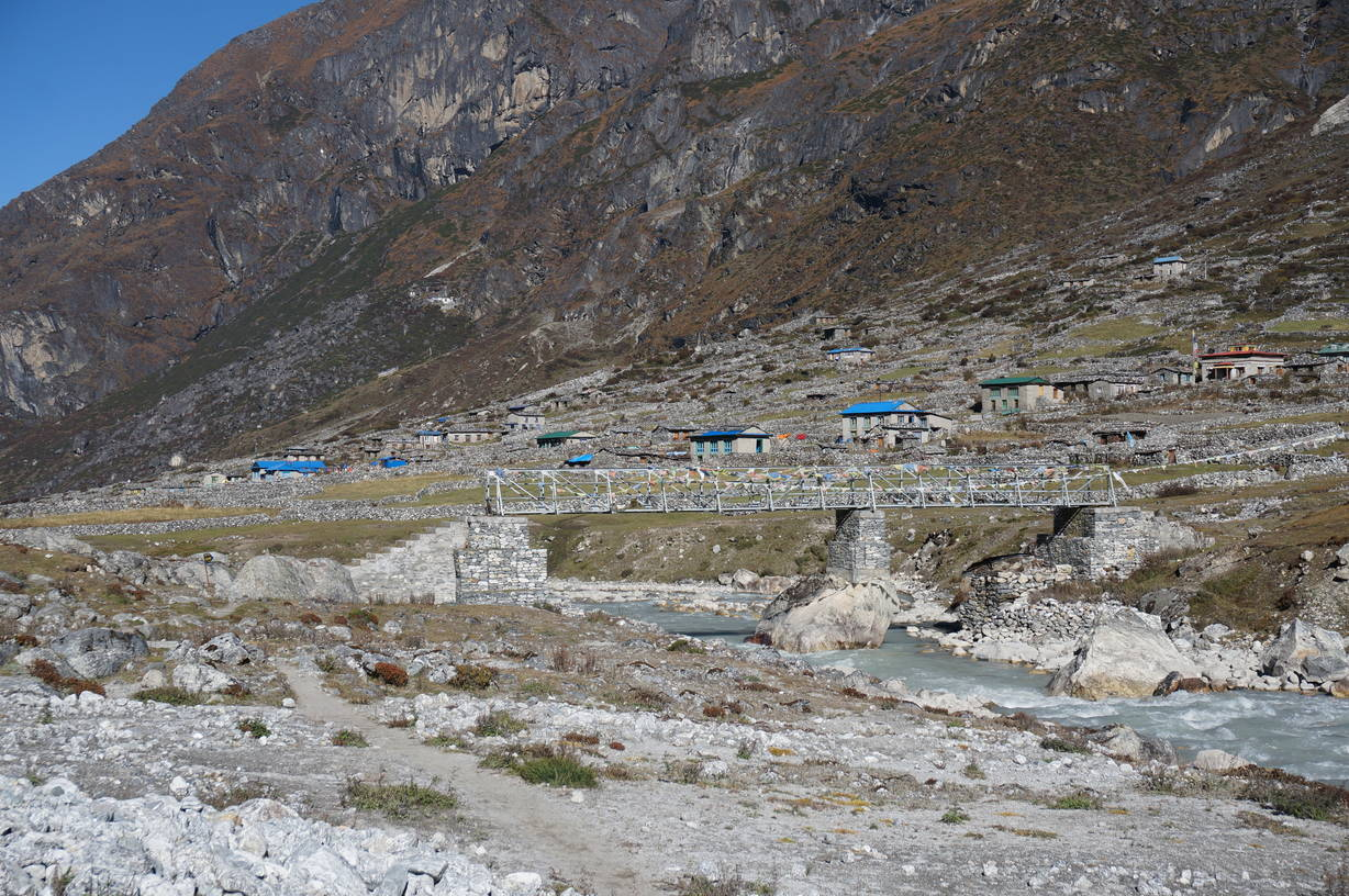 Sommersiedlung Na im Rolwaling Tal, Rolwaling Himal, Nepal, Himalaya